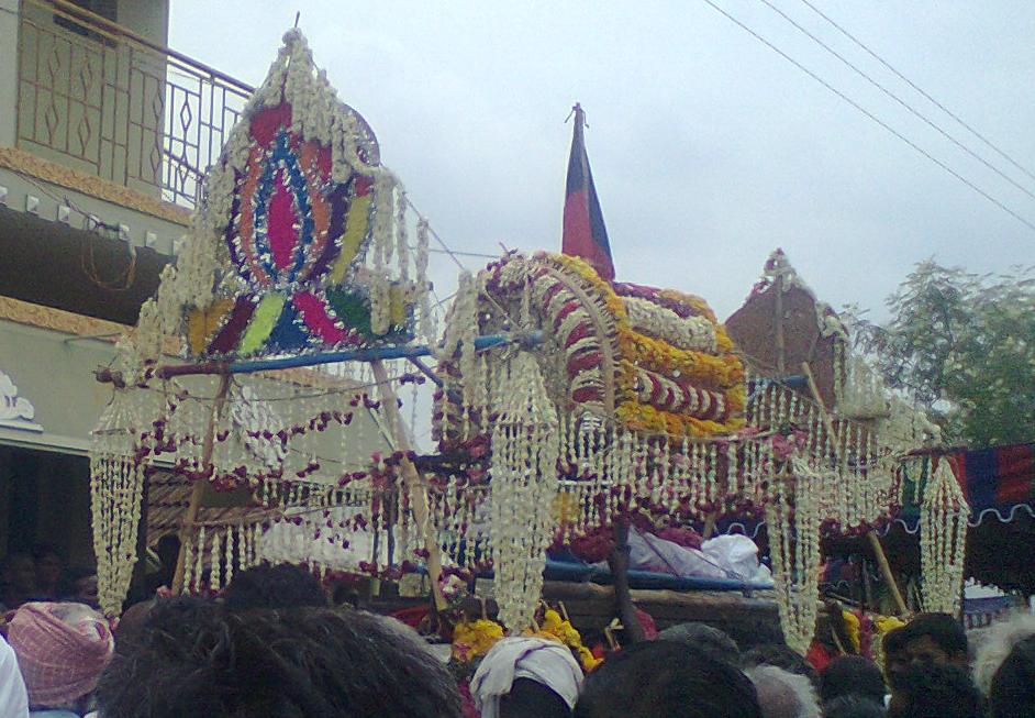 Corpse Flower Palanquin, A corpse is carried to crematorium in Tamil Nadu, India. A kind of culture of the Tamils. பிண ஊர்வலப் பூப் பல்லாக்கு.